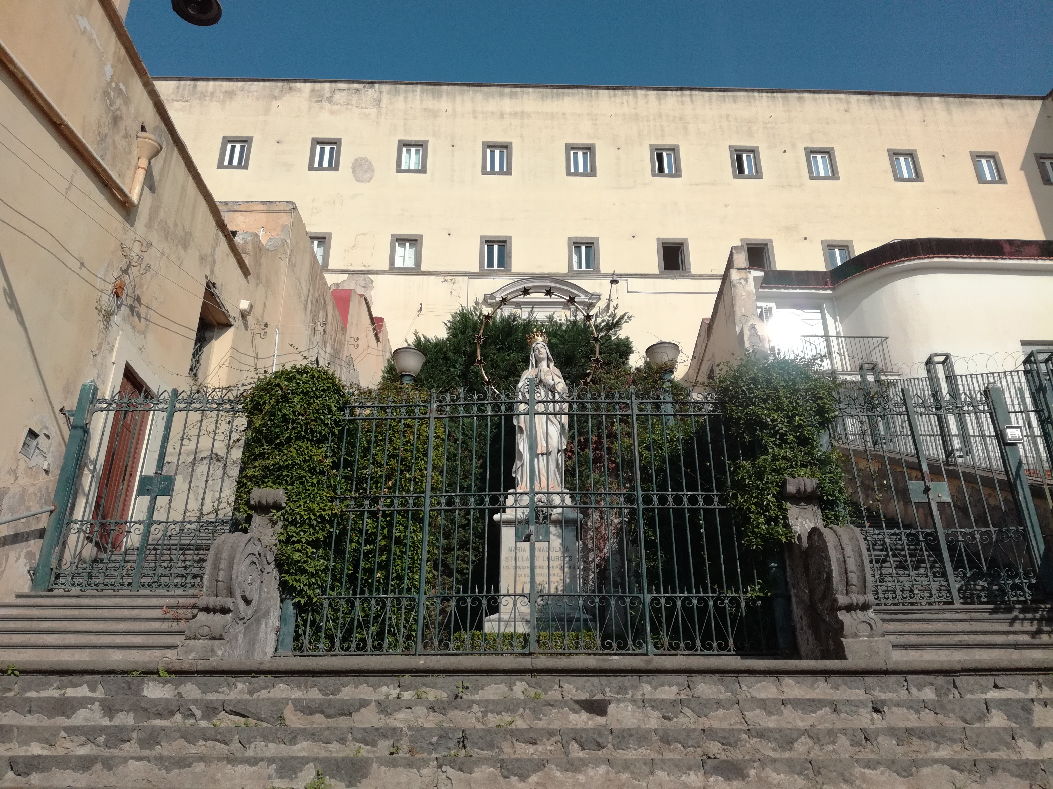 Una delle altre del Complesso di Suo Orsola Benincasa (Napoli)